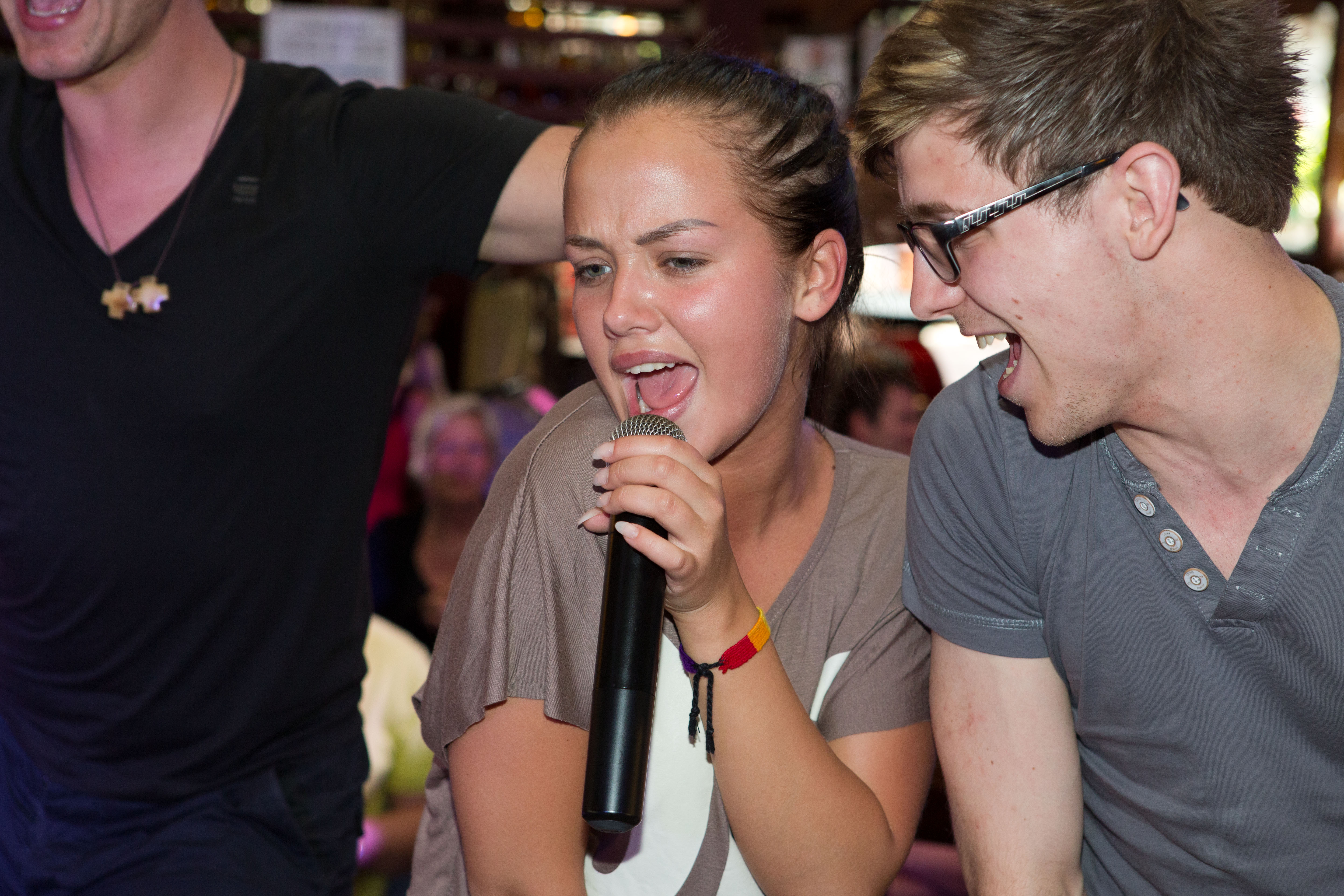 Kim "Gloss" Debkowski bei ihrem Auftritt im Bierkönig auf Mallorca am 30.04.2012